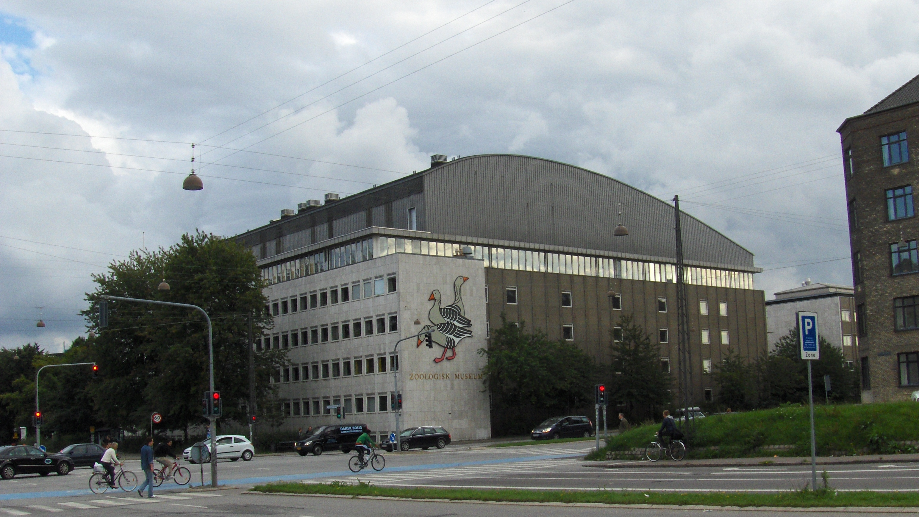 Zoologisk Museum